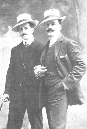 Los ilustres autores D. Serafín y D. Joaquín Álvarez Quintero, organizadores de la función con el Sr. Villegas. Obra del fotógrafo Kaulak.